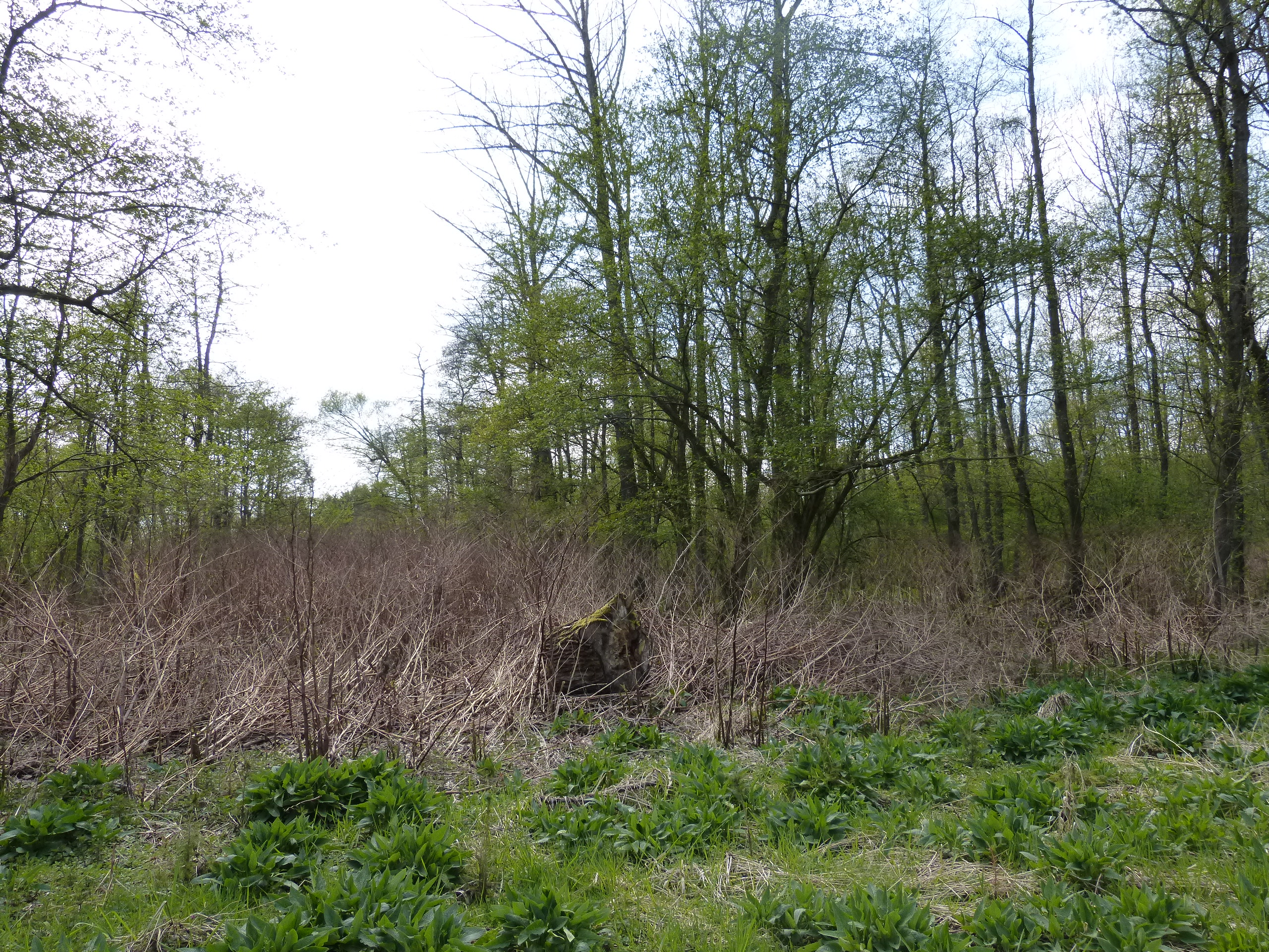 Wald zwischen Ententeich und Ruhr im Naturschutzgebiet „Auf dem Stein“ in Menden